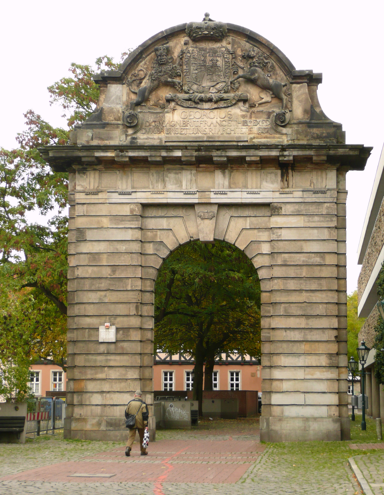 Marstalltor Hannover 09